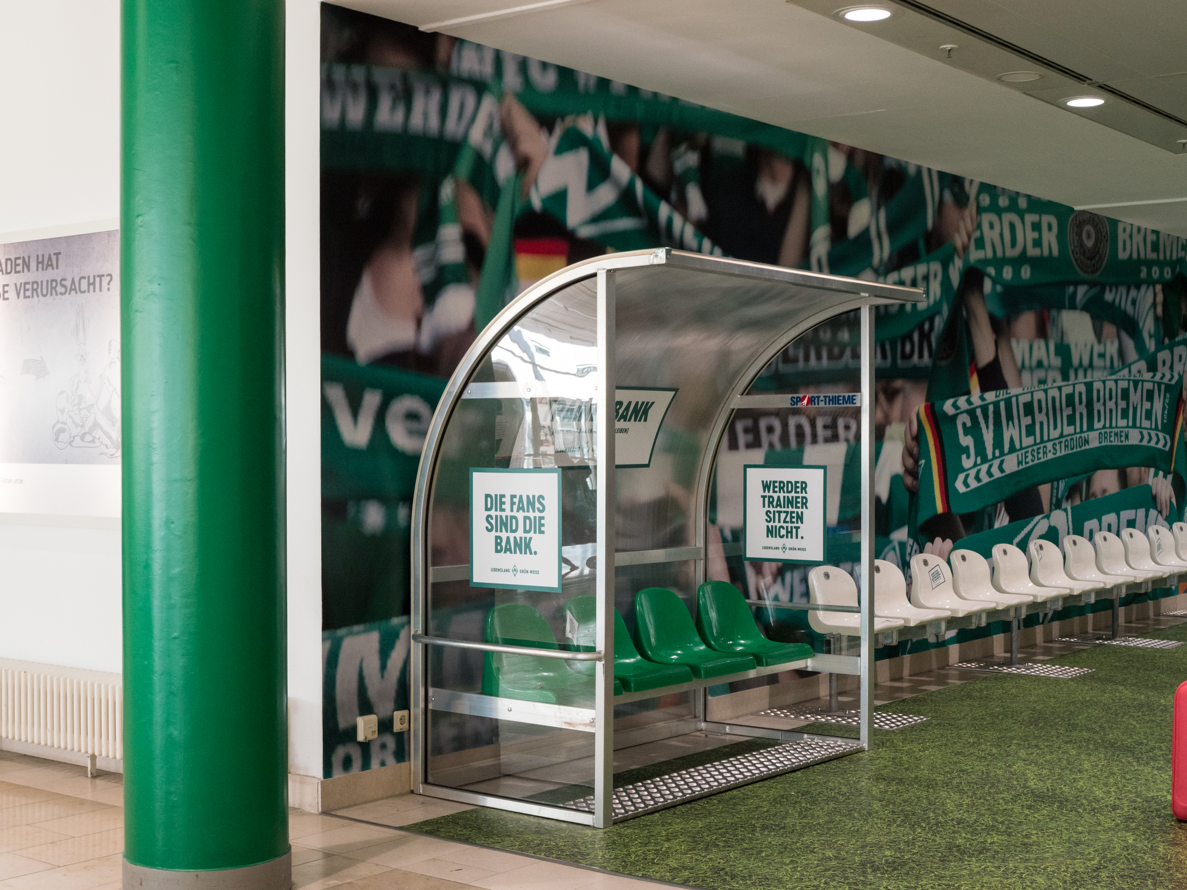 Bremen: Werder Fan-Ecke im Wartebereich des Flughafens.